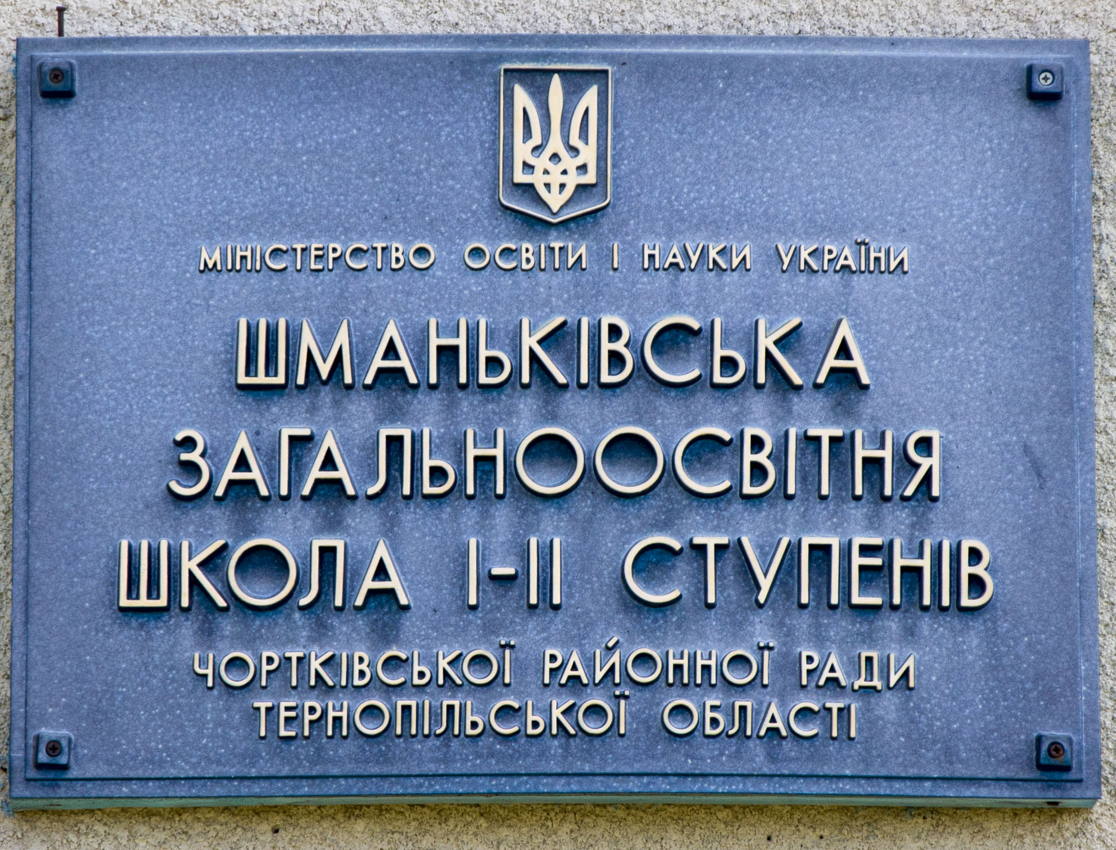 Вивіска на школі (1902р.) в селі Шманьківці Чортківського району Тернопільської області України.